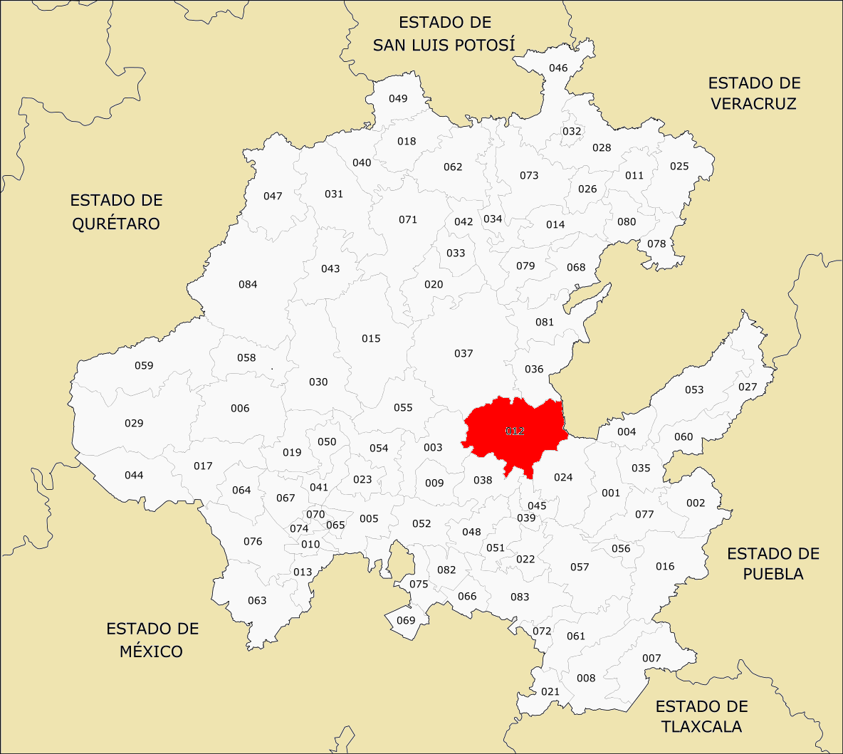 Municipio de Hidalgo